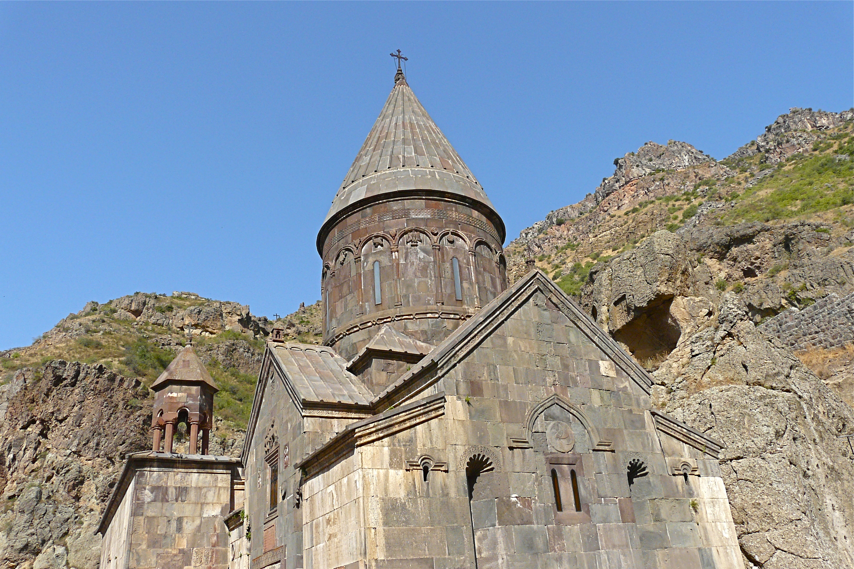 Holenklooster op het einde van de Aziatschlucht, en in de 8ste en 10de eeuw verwoest door Arabieren. In de 13de eeuw, onder de Zakharjanen, werd de hoofdkerk gebouwd. De Zakharjanen hebben Armenië van de Seldsjoeken gevrijwaard. Daarna werden de holen tot kerken omgevormd. Het kloostercomplex bestaat uit wooncellen voor de monniken, de kerk Moeder Gods, holenkapellen en profane gebouwen. zie ook